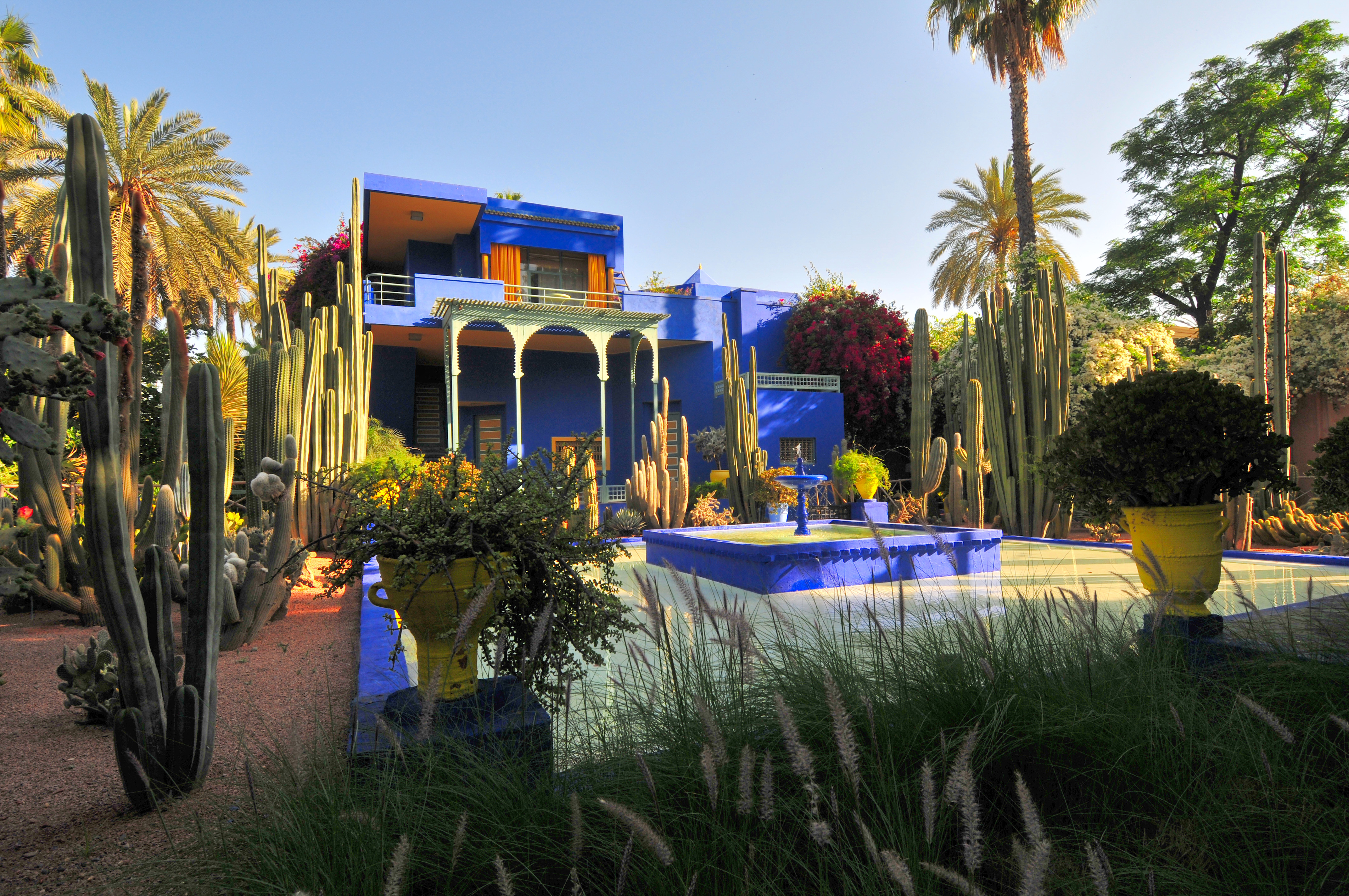 Jardin_des_majorel\Le jardin des majorelle l3.JPG marrakech maroc